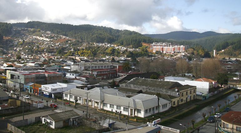 Penco